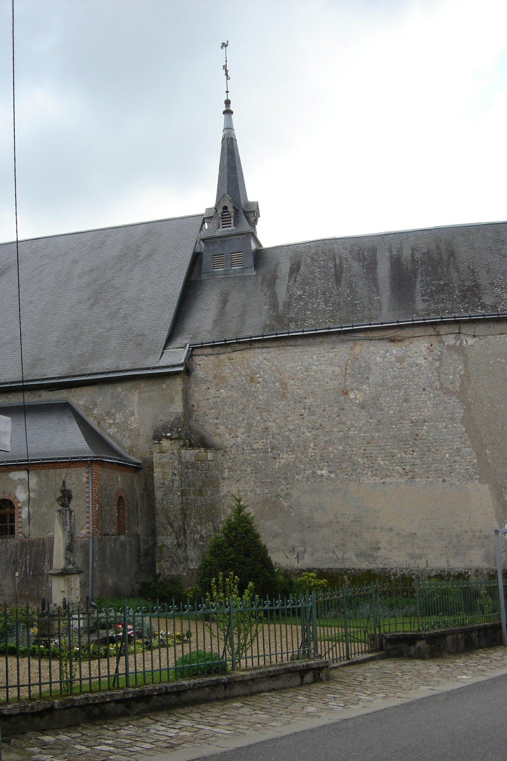 Eglise Saint-Pierre, mur nord en petit appareil avec trace des ouvertures du Xe ou XIes., sacristie et monument aux morts, Cerelles (F37)